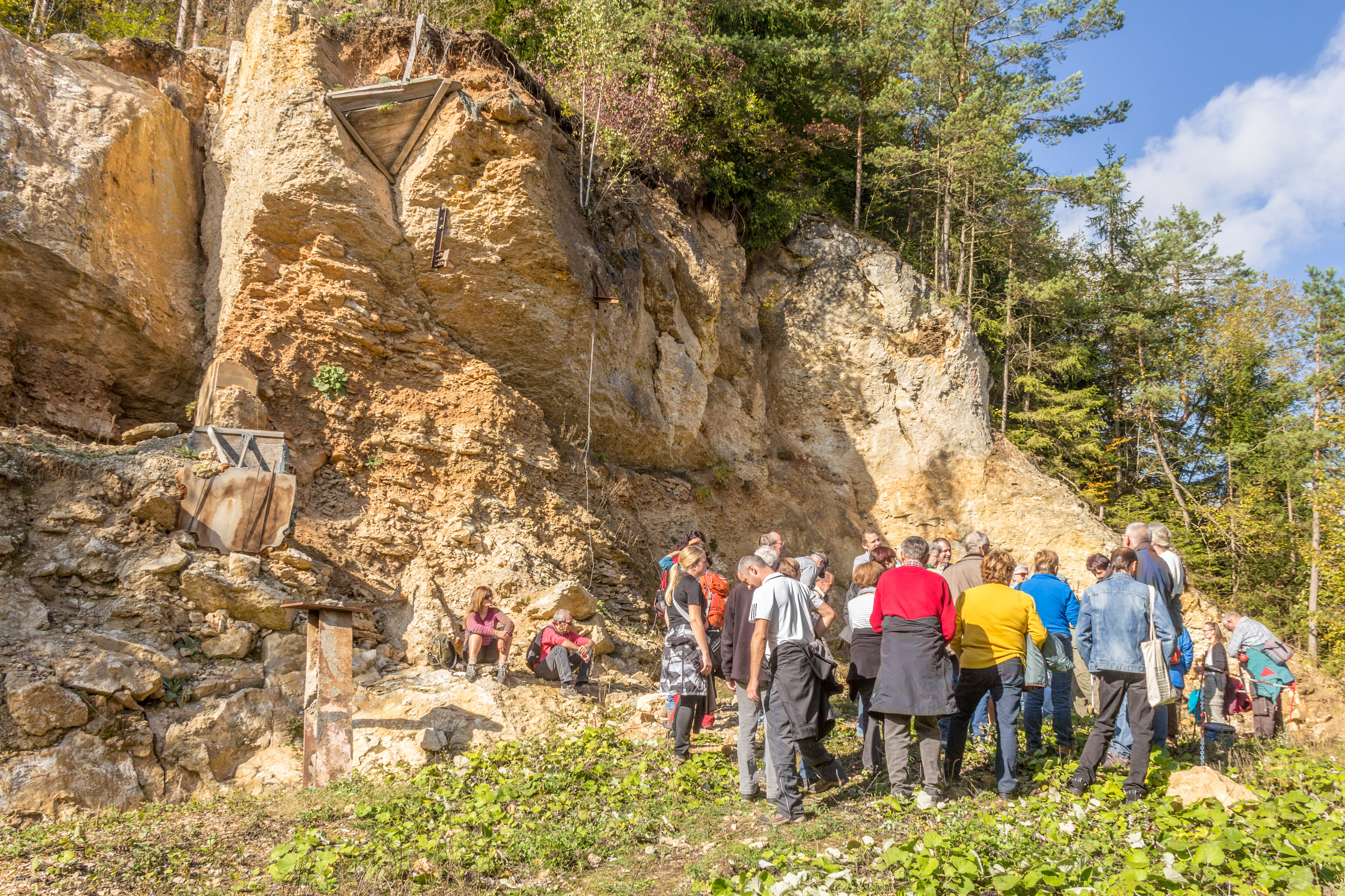 Steinberg-Höhlenruine, A 236, Hunas